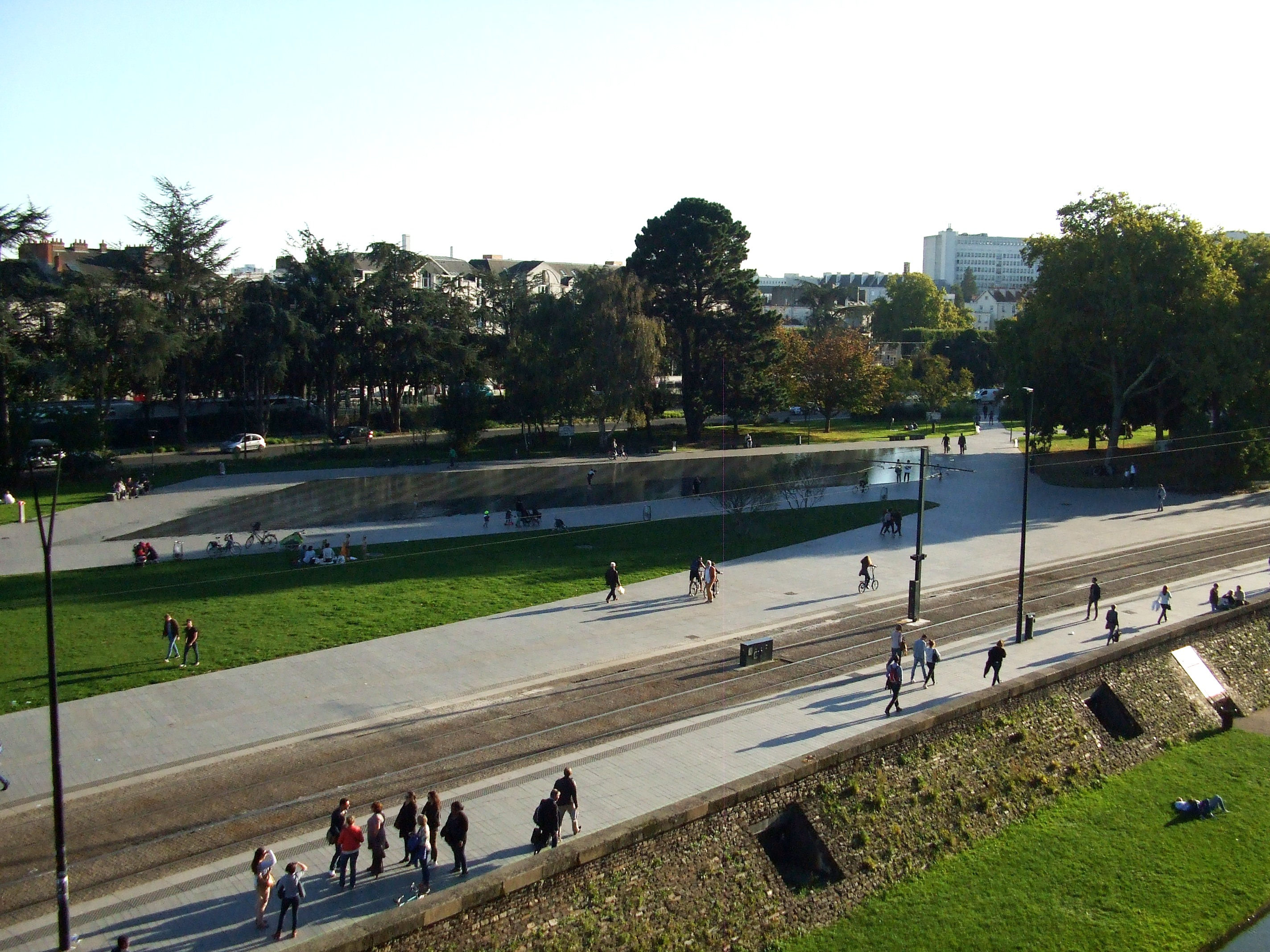 Square Élisa-Mercœur - Nantes